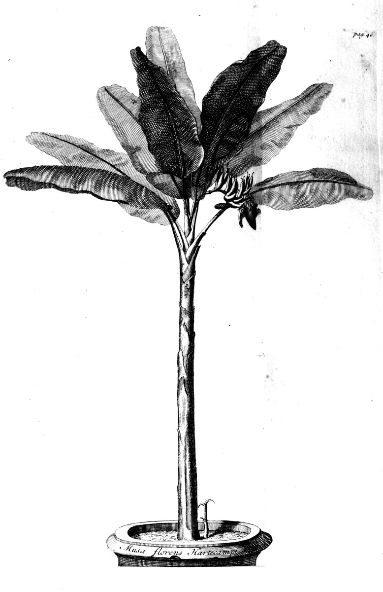 Tafel mit der Abbildung der Banane (Musa) in Carl von Linnés Musa Cliffortiana , 1. Auflage, 1736